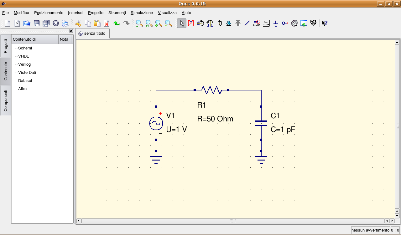 Screenshot del software Qucs, simulatore di circuiti elettronici